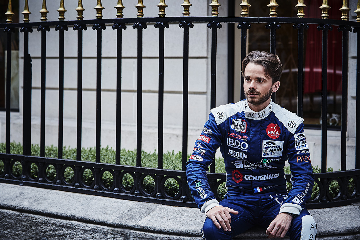 Alexandre Cougnaud en 2017